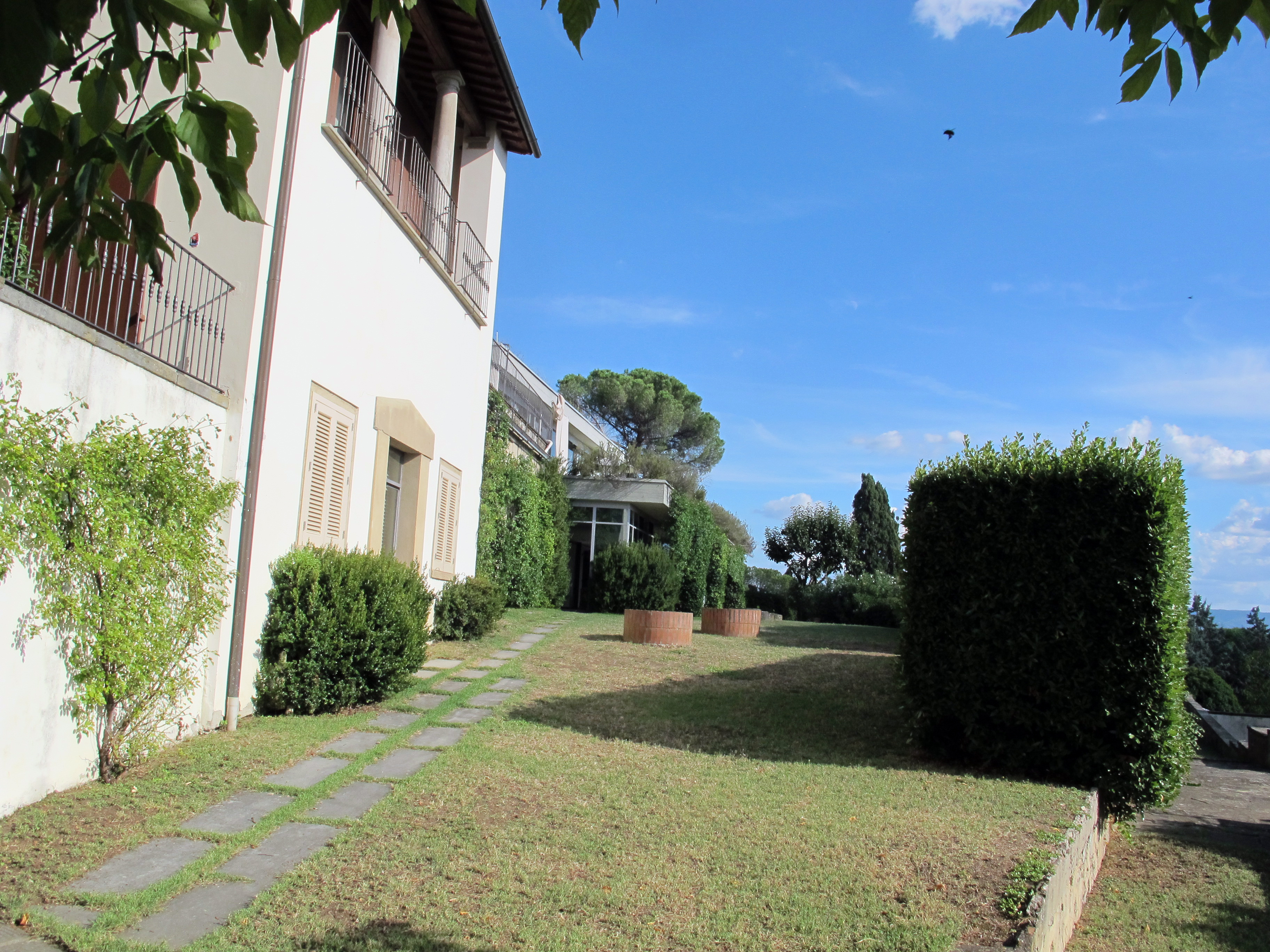 Ville di Fiesole